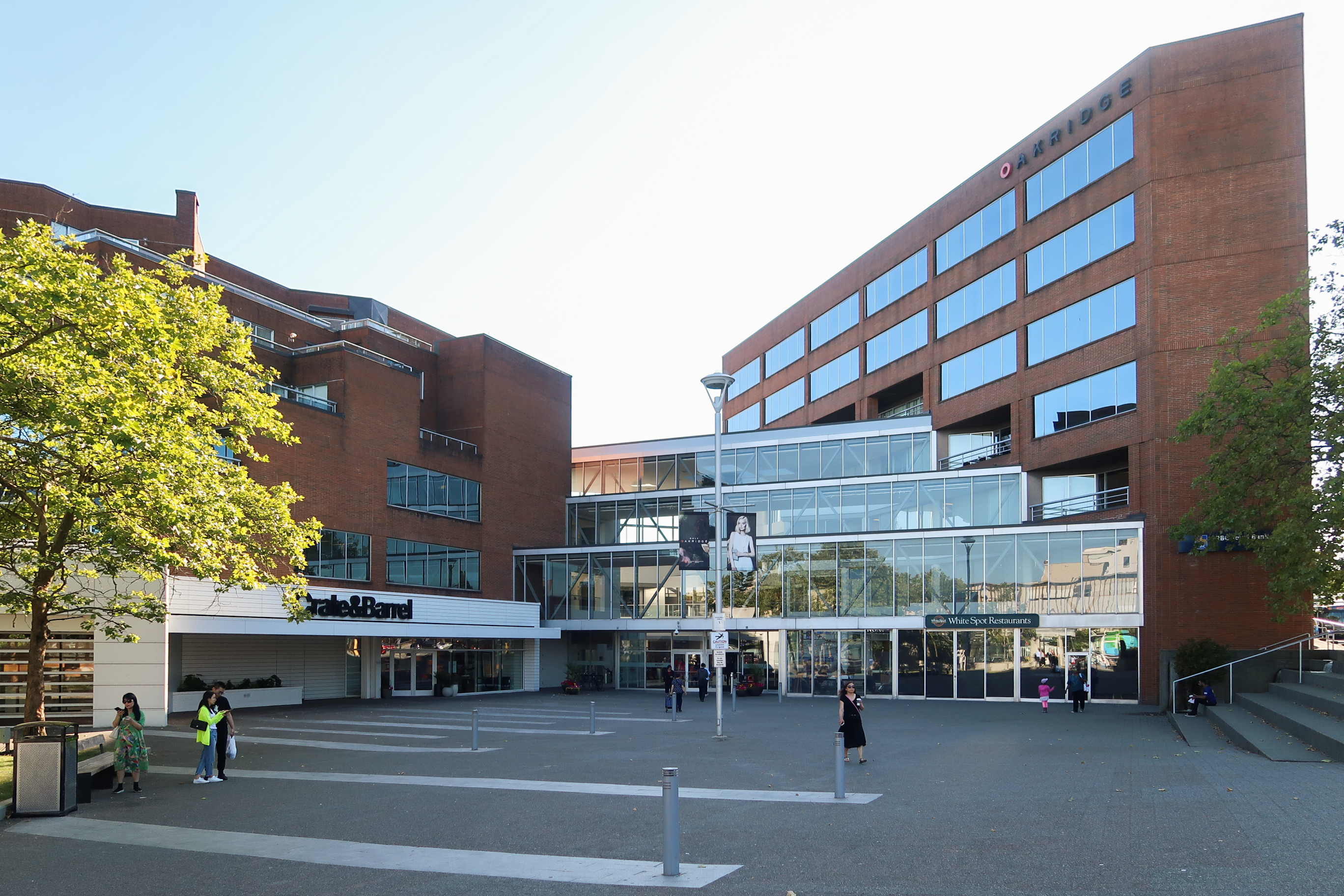 Oakridge Centre